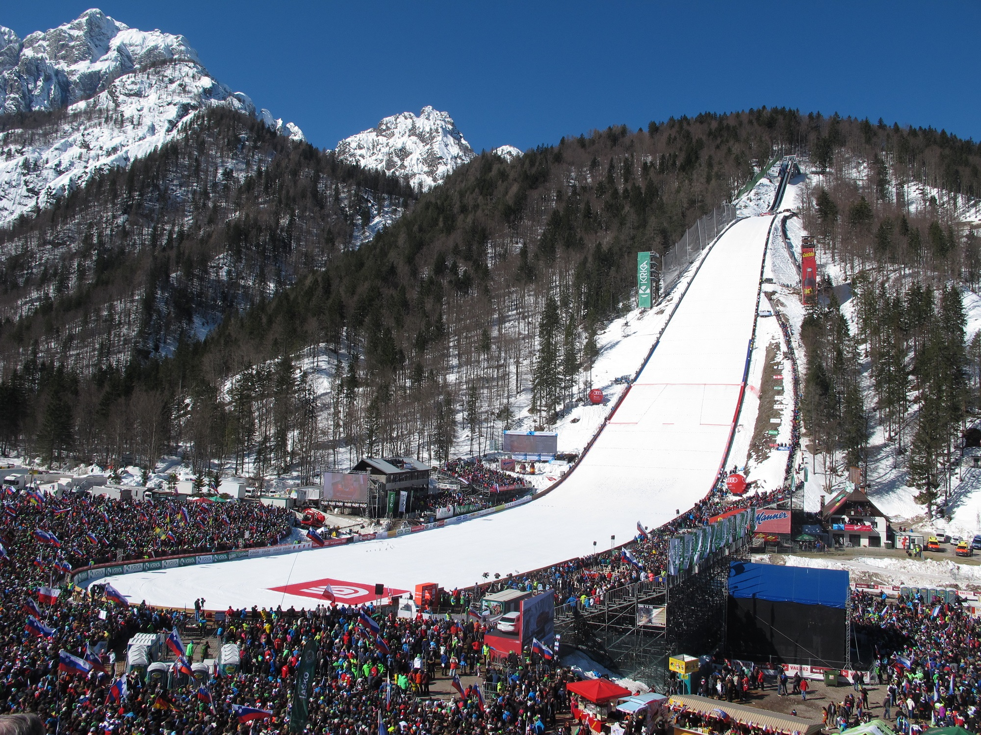 Slovenska vojska je tudi letos podprla Smučarsko zvezo Slovenije pri izvedbi zaključka svetovnega pokala v smučarskih poletih v Planici.